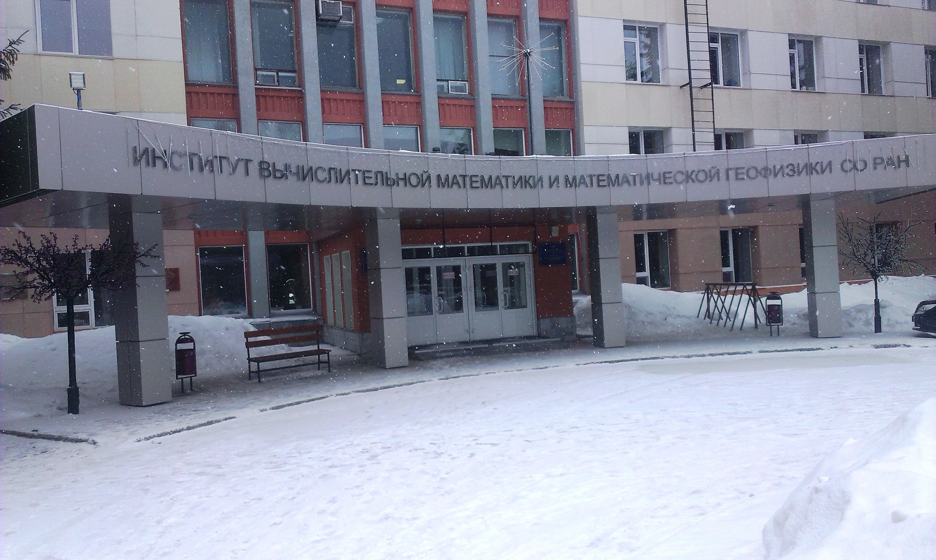 Новосибирский Академгородок